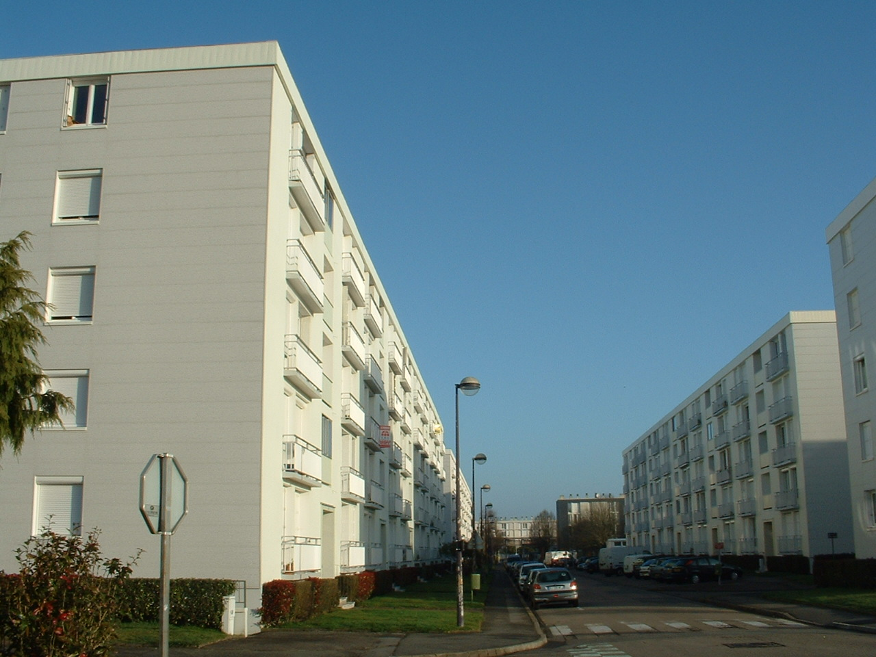 Aperçu de l'urbanisme du quartier Château de Rezé